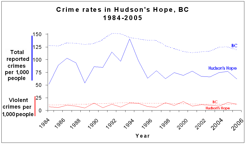 crime trends